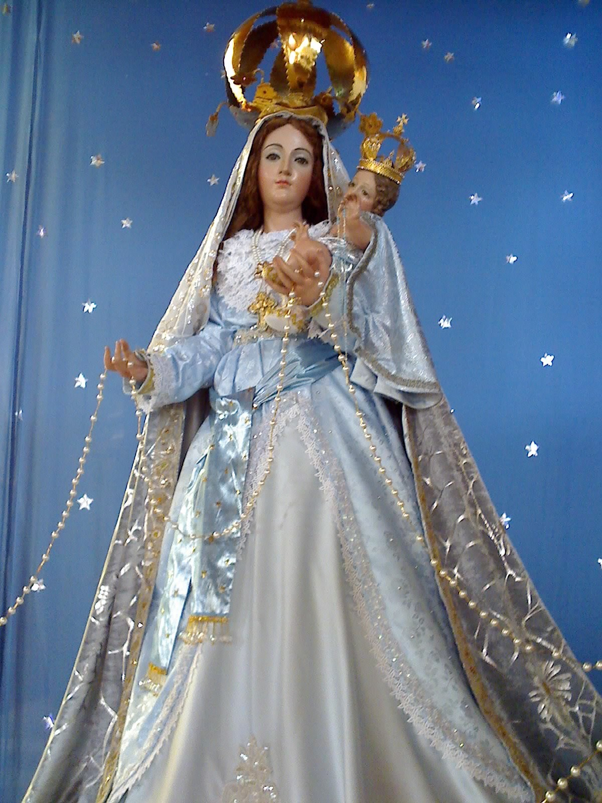 Virgen del Rosario, Patrona de la Diócesis de Estelì